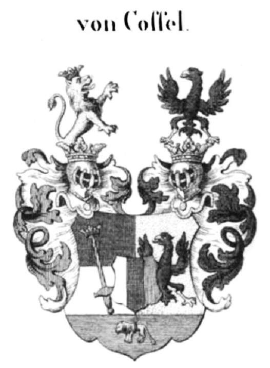 Wappen der von Cossel (in Preußen anerkannt den 25. Juli 1668)